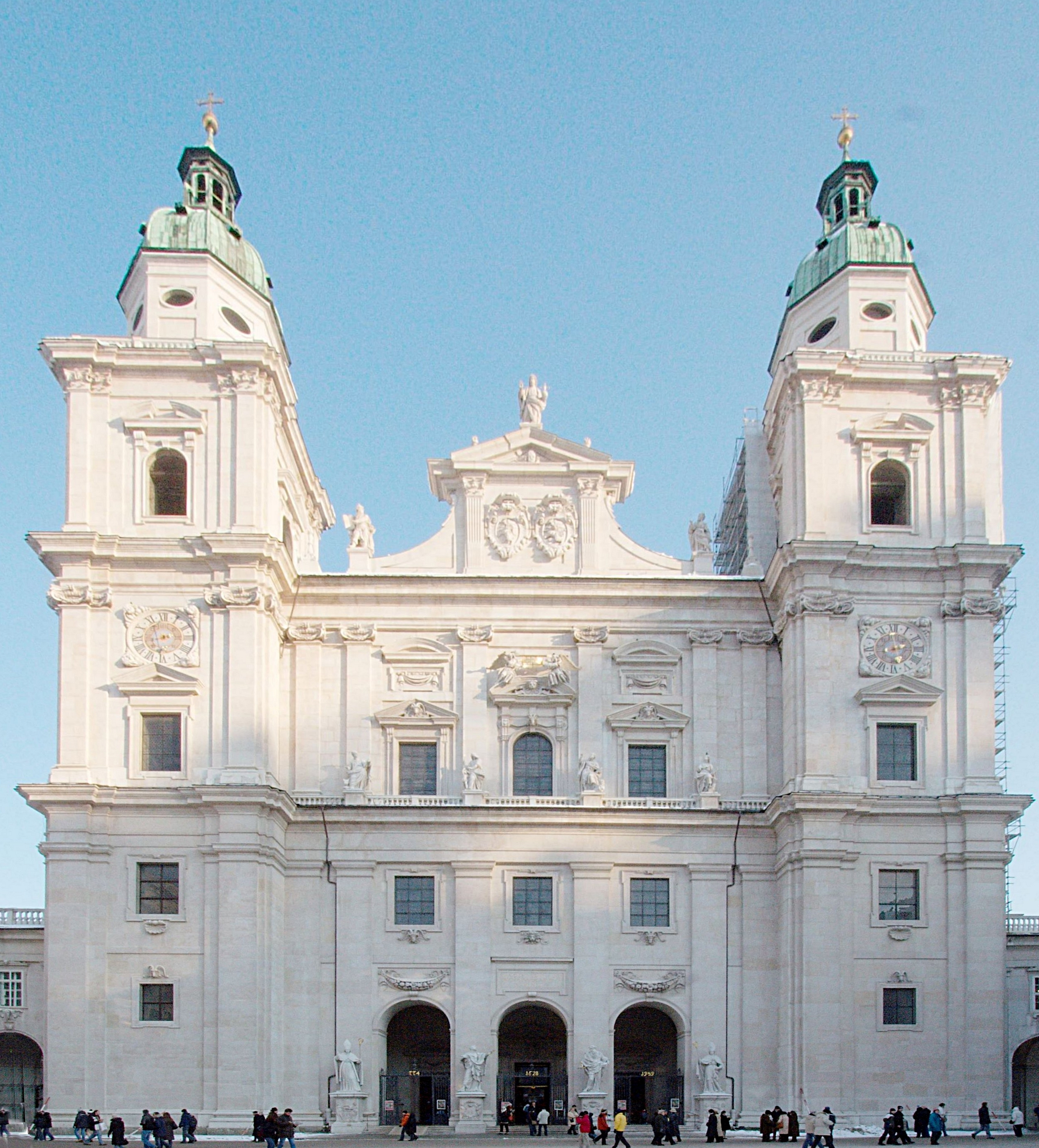 Frontview of the Cathedral in Salzburg; Bearbeitung:(Stürzende Linien entfernt,duc gedreht) von Image:Salzburg cathedral frontview.jpg [1]; Original von User:MatthiasKabel